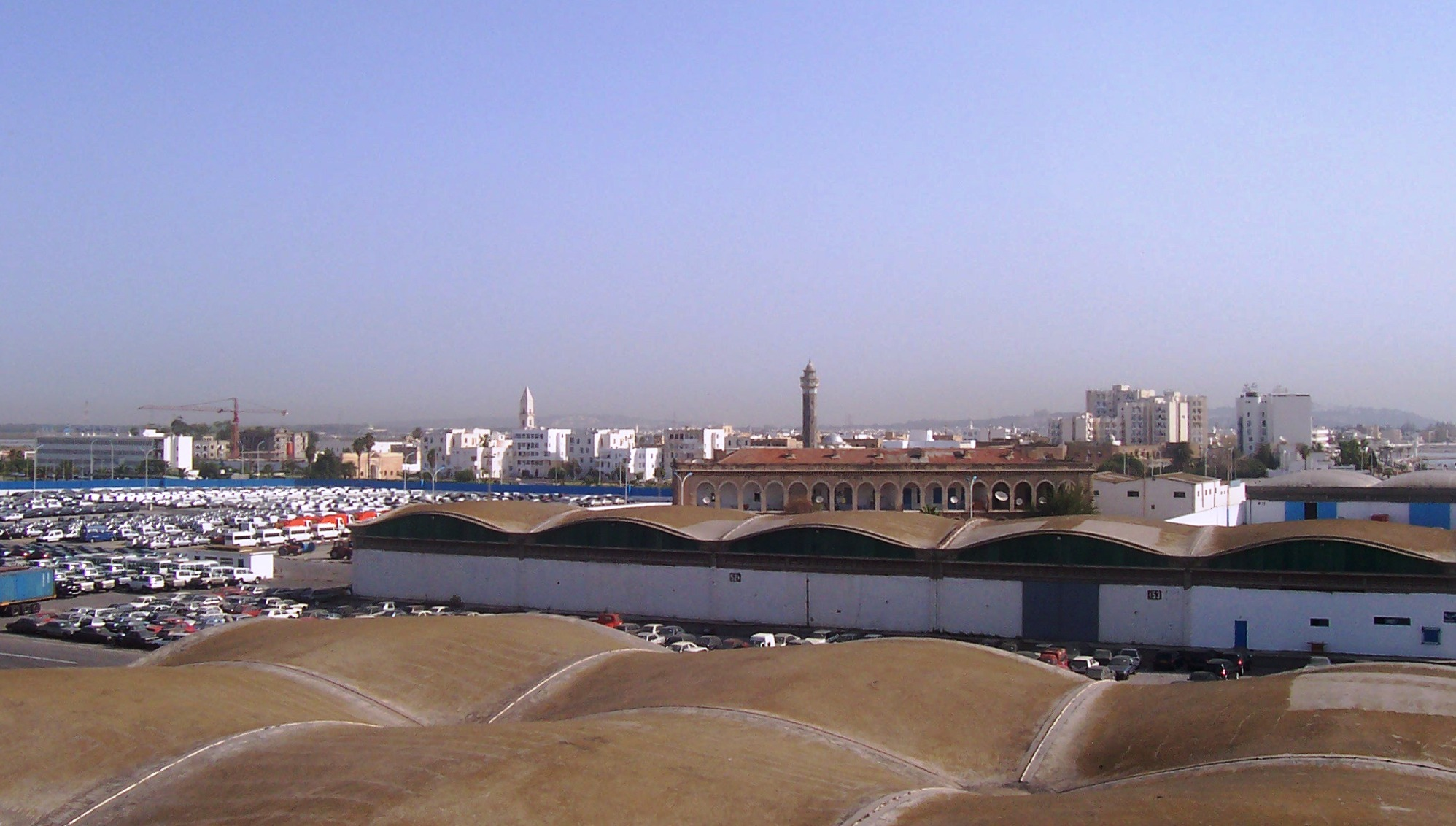 La Goulette, Tunis, 2004